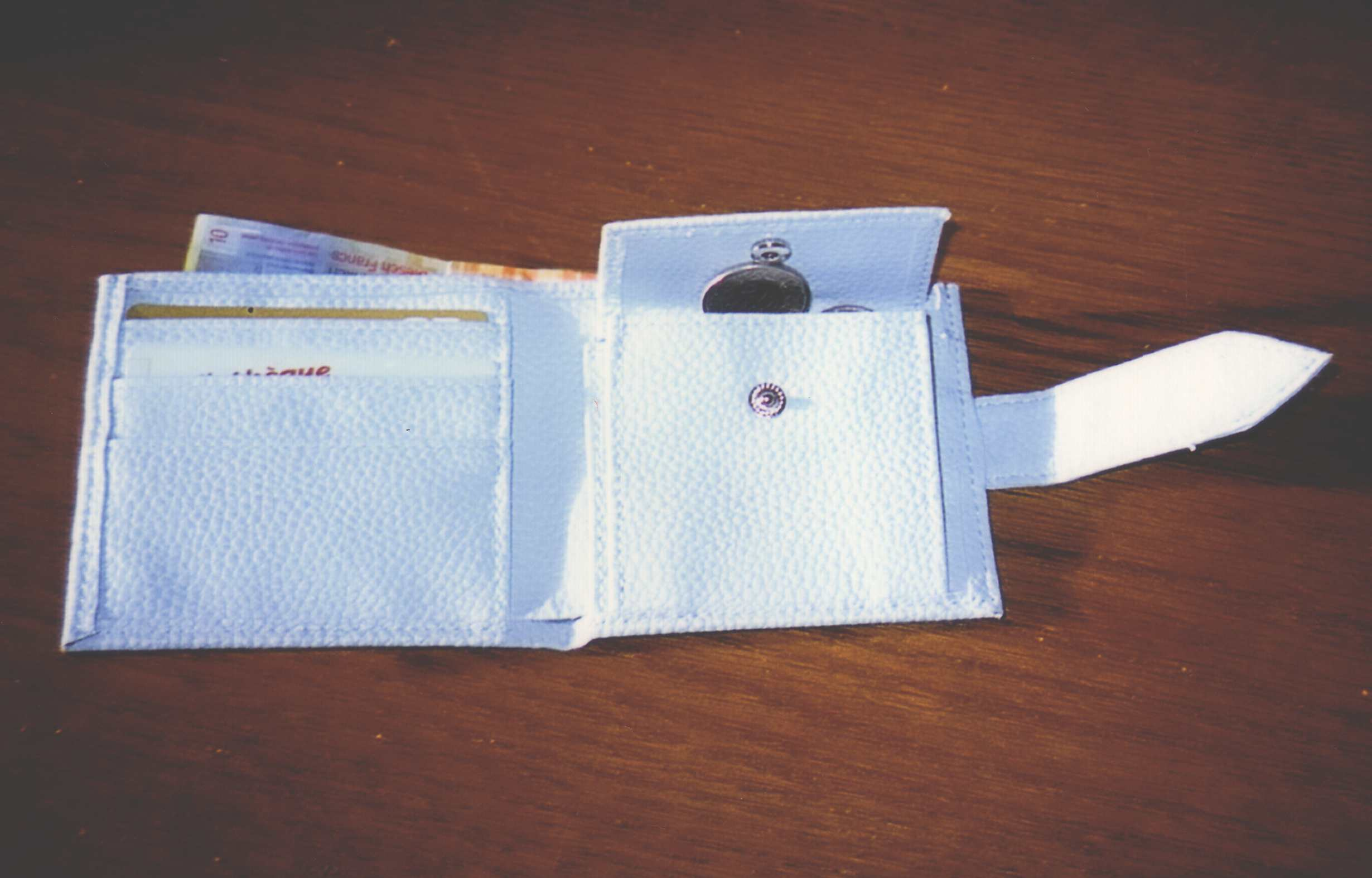 Portemonnaie for euros